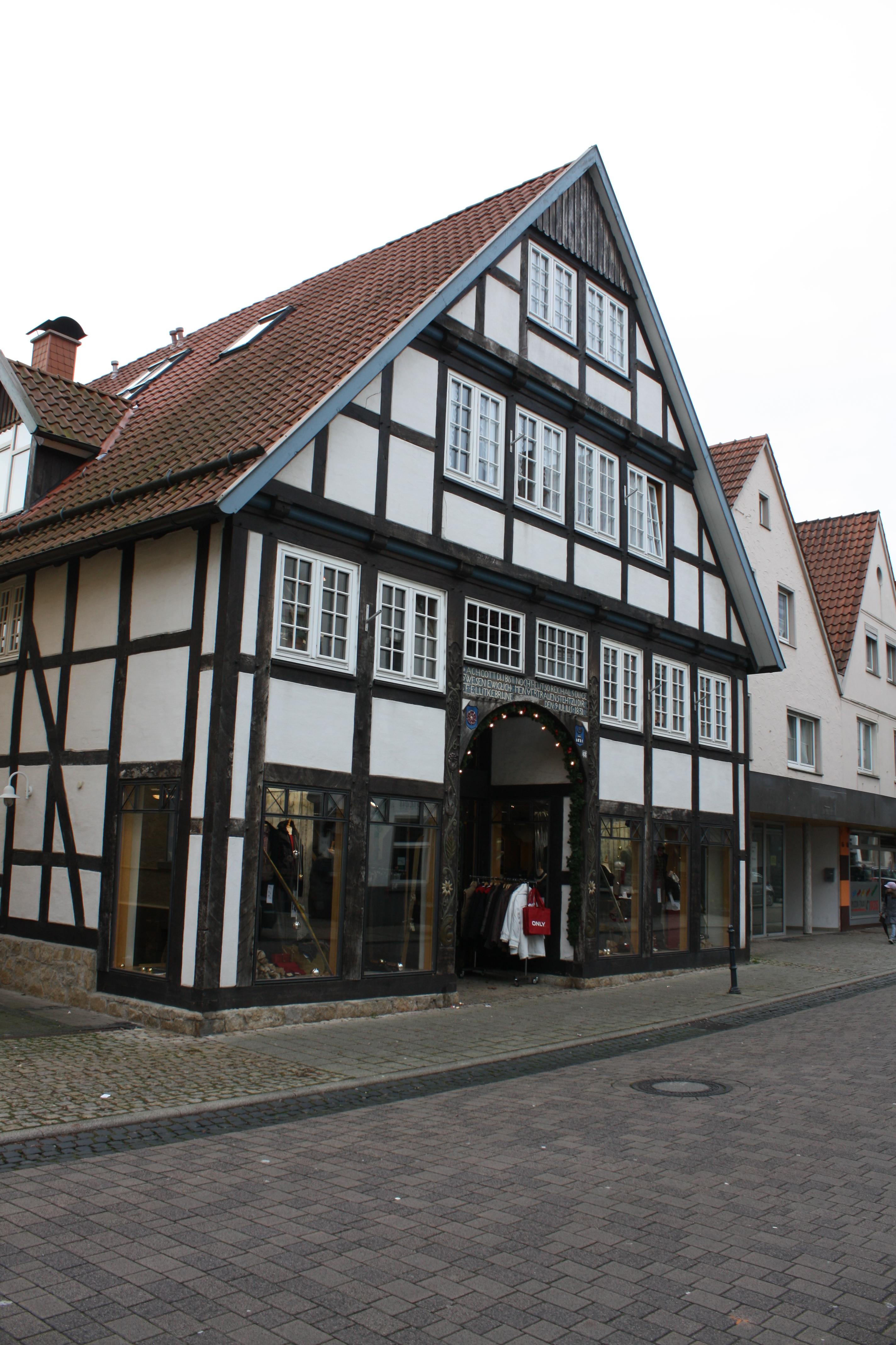 Fachwerkhaus Mittelstraße 68 in Horn-Bad Meinberg